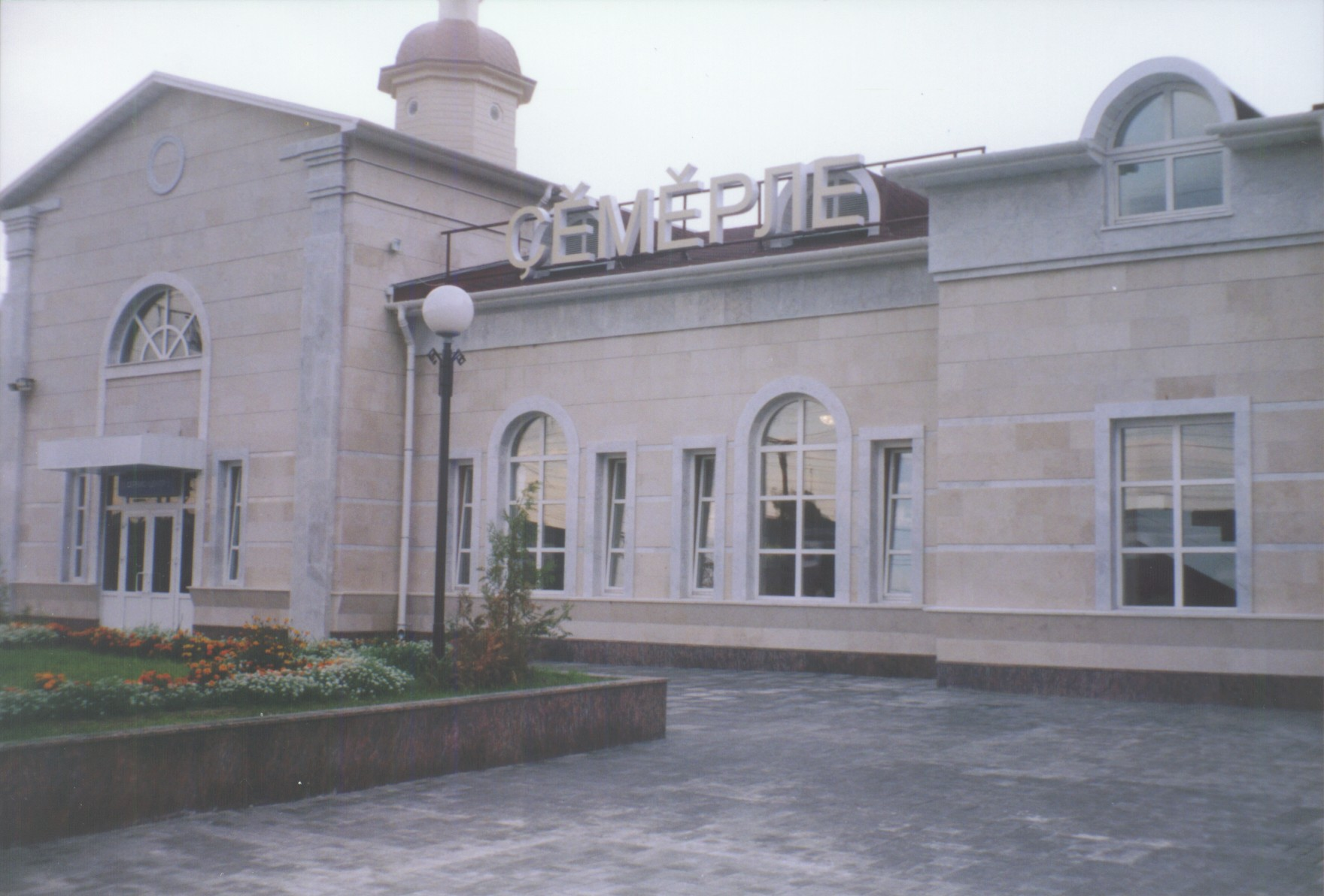 Nomo de stacio sur fervoja stacidomo de Ŝumerla, skribita en la ĉuvaŝa lingvo.